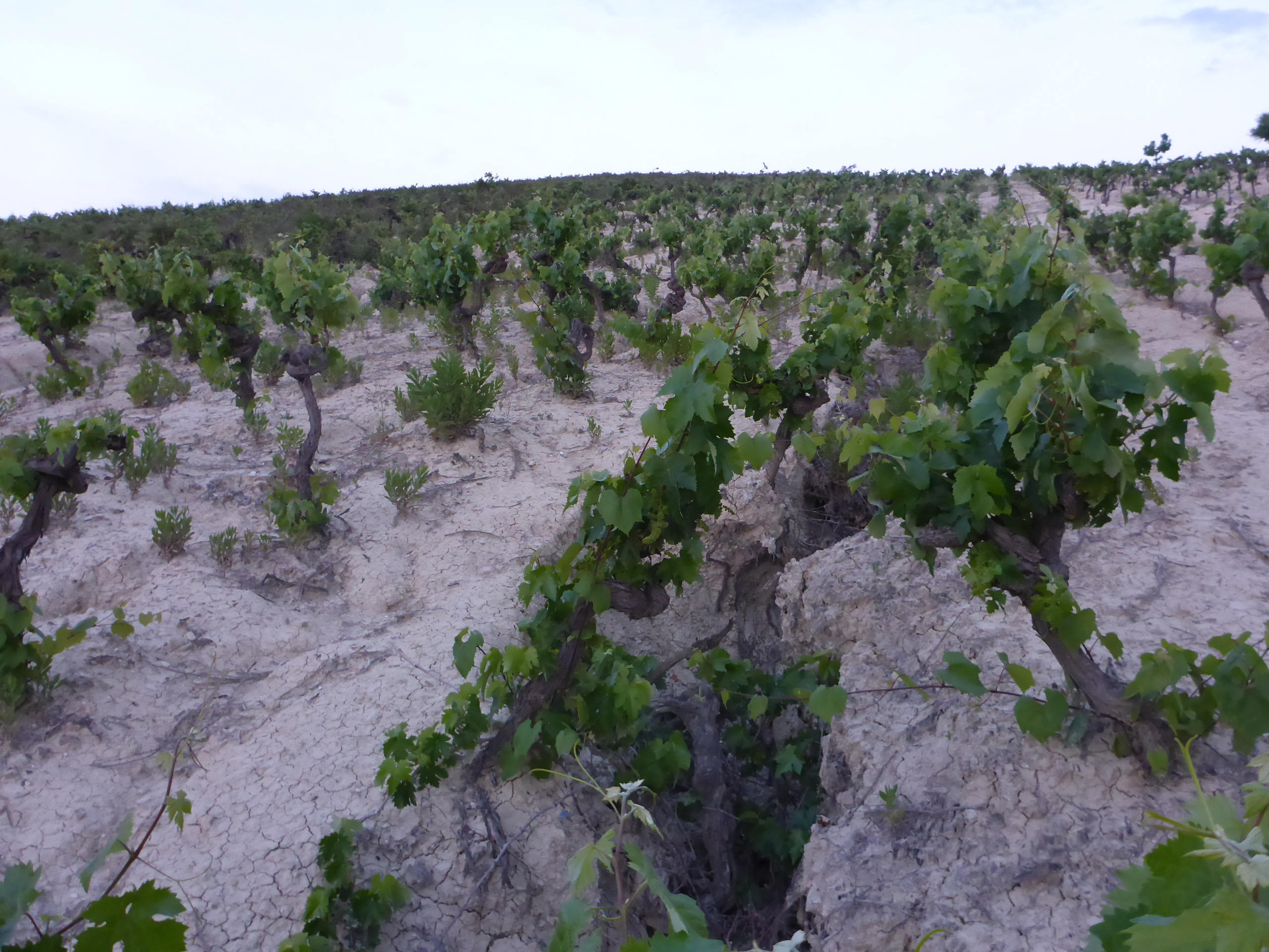 Viñedos en tierra albariza, Jerez de la Frontera